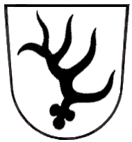 Wappen der Herren von Hirschhorn